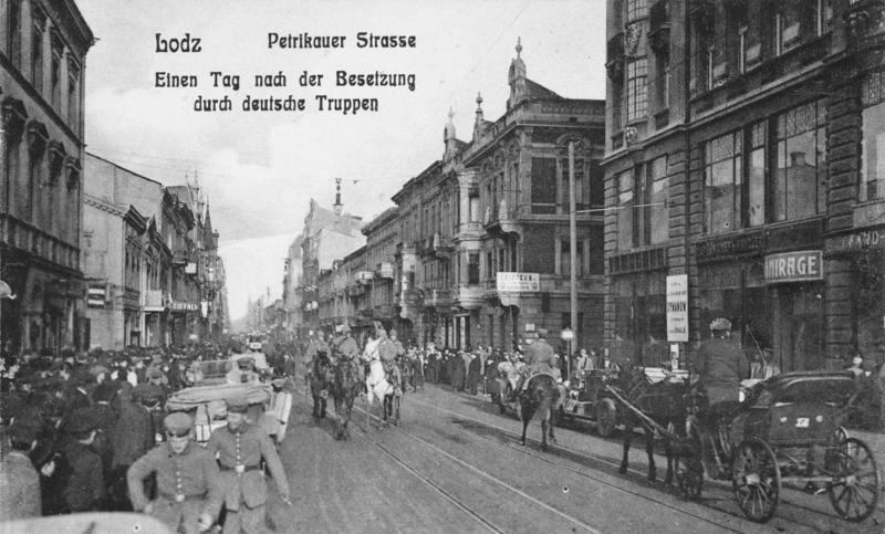 Lodz Petrikauer Strasse Einen Tag nach der Besetzung durch deutsche Truppen Aufn. von Jakubowski, Danzig Information added by Wikimedia users.pl: Ulica Piotrkowska w Łodzi w 1914 r. (skrzyżowanie z ul. Traugutta) de: Die Petrikauer Straße (ul. Piotrkowska) in Łódź im Jahr 1914